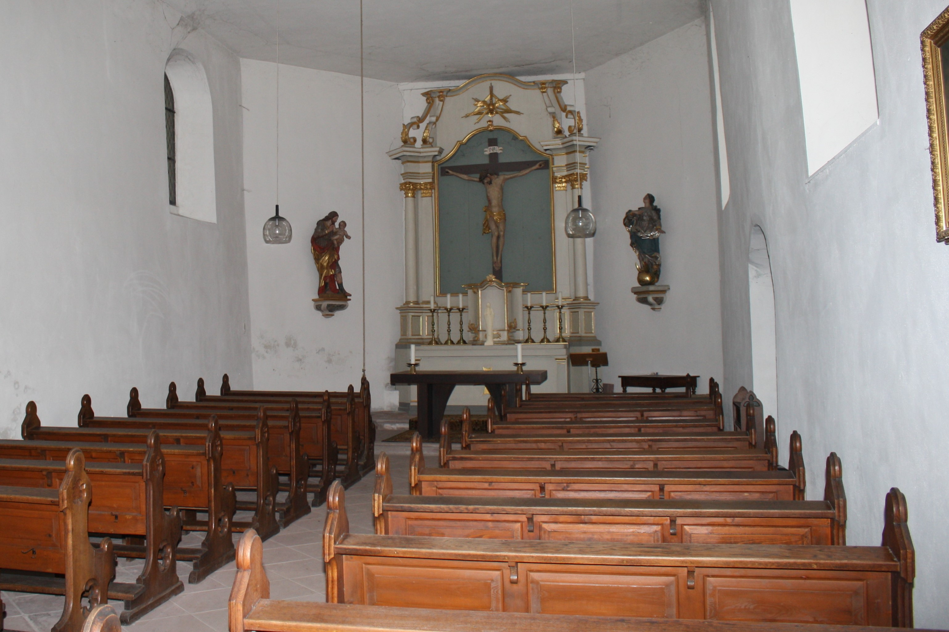 Innenansicht der Hl. Kreuzkapelle bei Lorch / Rheingau